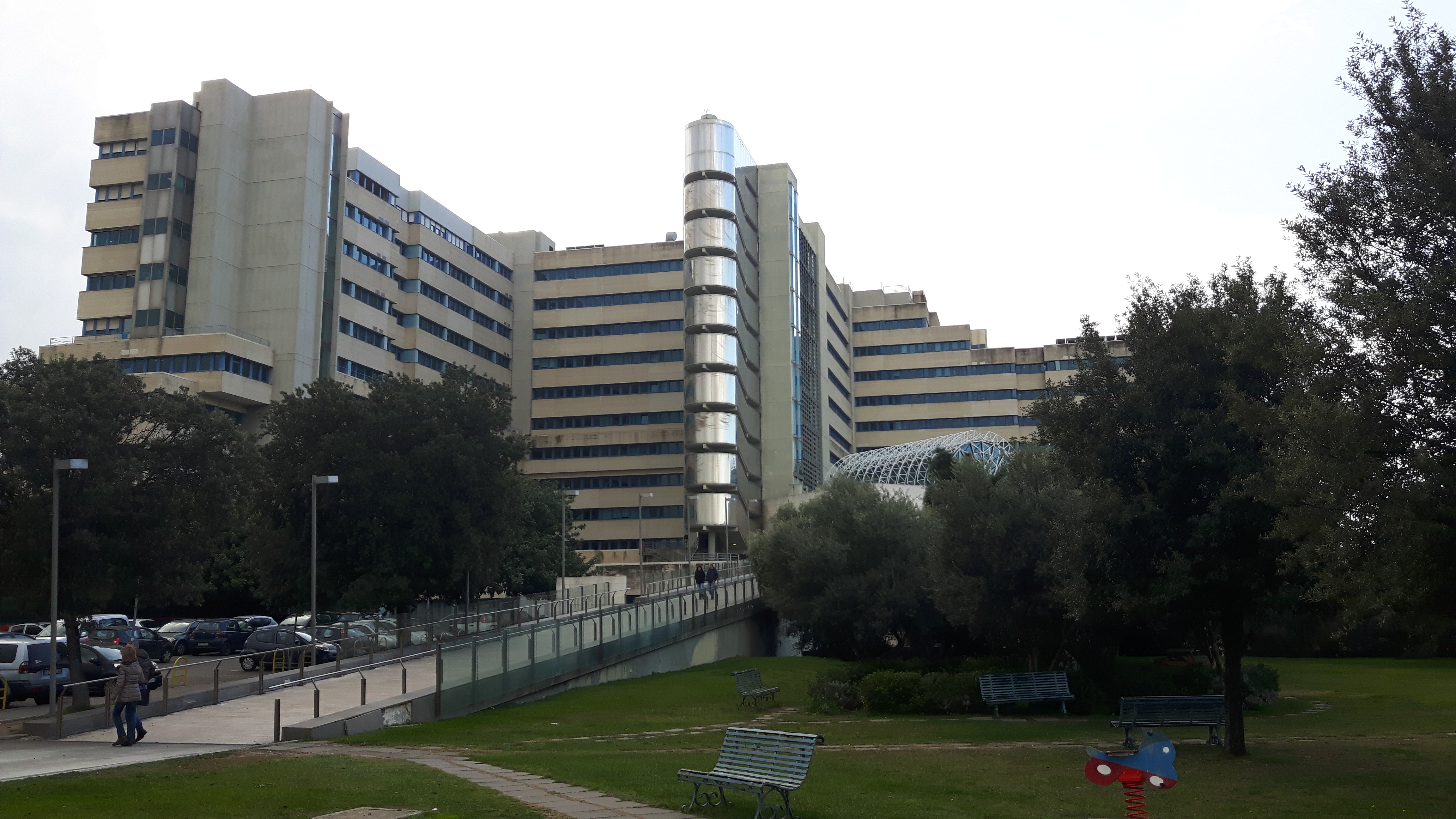 rampa d'accesso e scale antincendio dell'ospedale San Michele a Cagliari